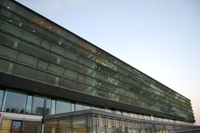 ENERGYbase Wien Floridsdorf